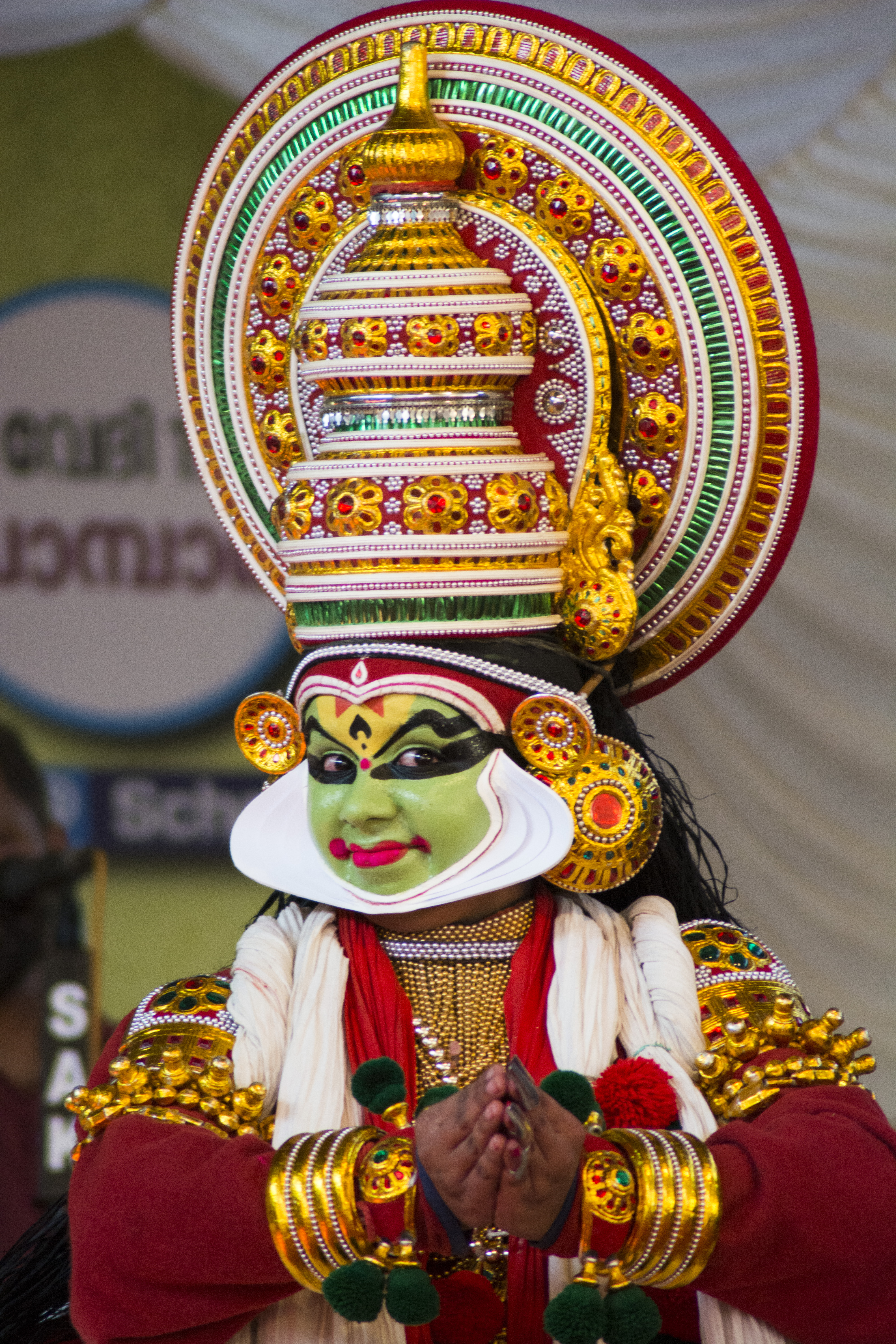 കേരള സ്കൂള്‍ കലോത്സവം 2017 കണ്ണൂര്‍. കഥകളി.